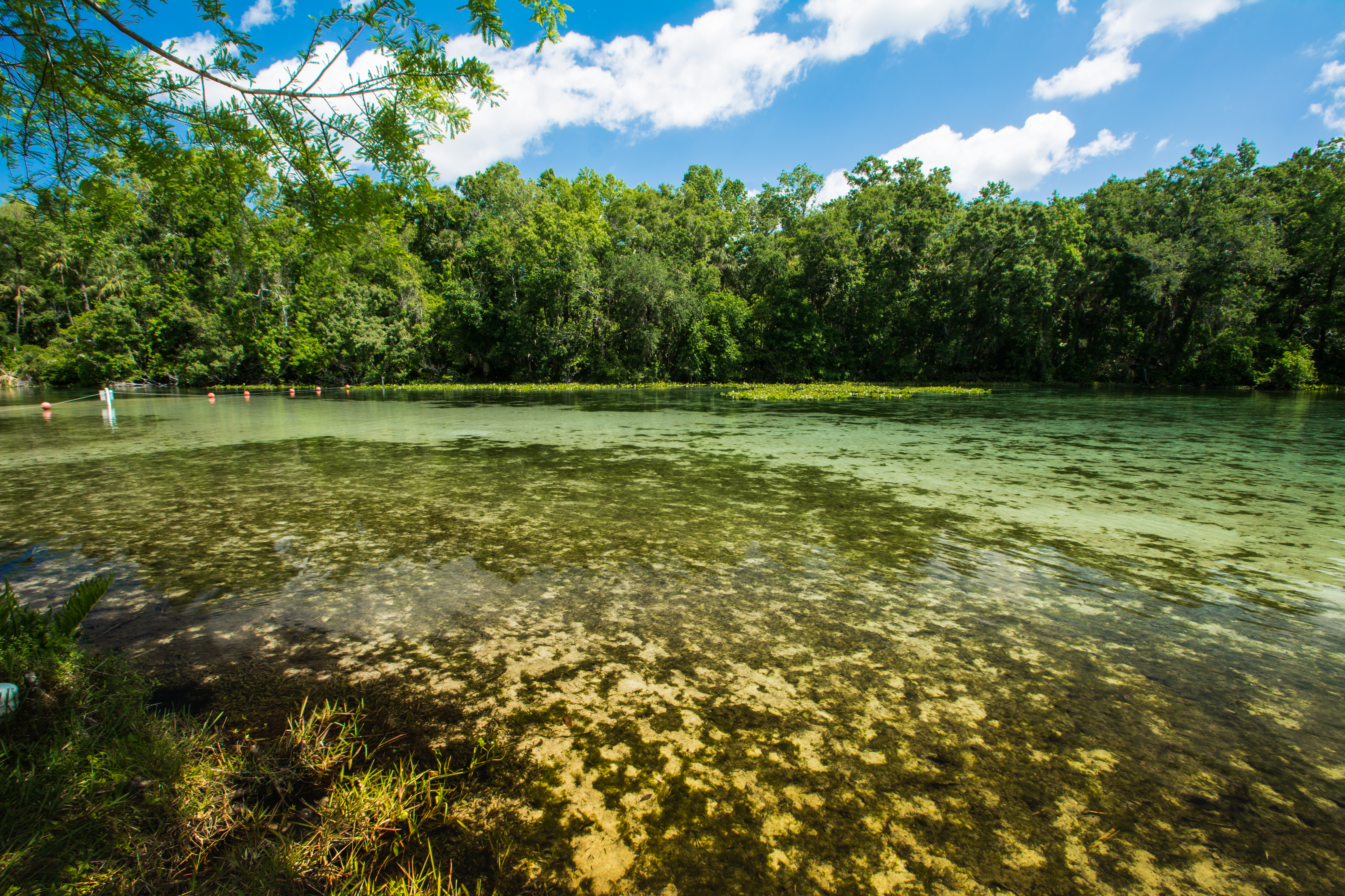 Alexander Springs